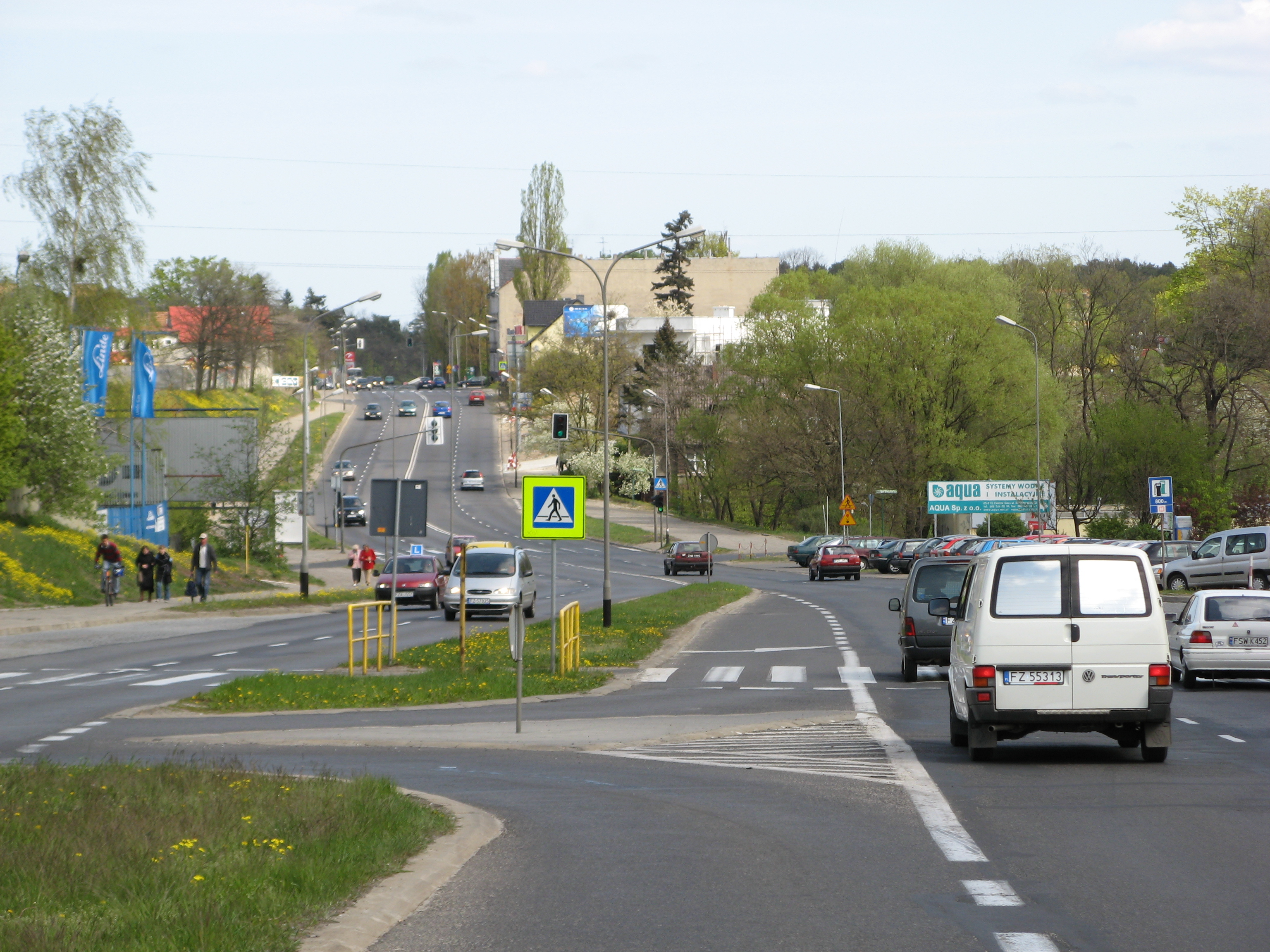 Zielona Góra - ulica Sulechowska